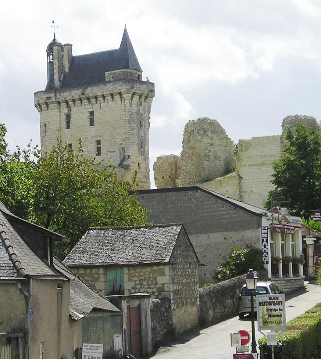 Chinon, Château